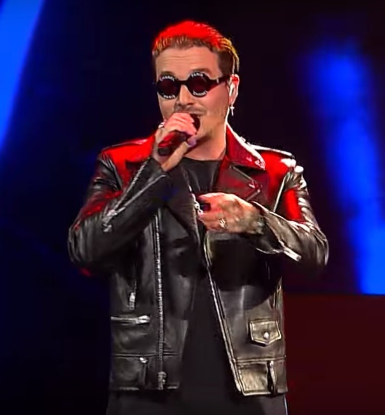 Directamente desde Medellín, Colombia, José Álvaro Osorio Balvin, conocido por su nombre artístico como J BALVIN, se presenta por primera ante el público chileno eligiendo al “monstruo” de la Quinta Vergara como primer jurado de su show, entregando una performance sobre el escenario que mantuvo encendida a las más de 15 mil personas que asistieron a esa noche de cierre del Festival de Viña 2017.